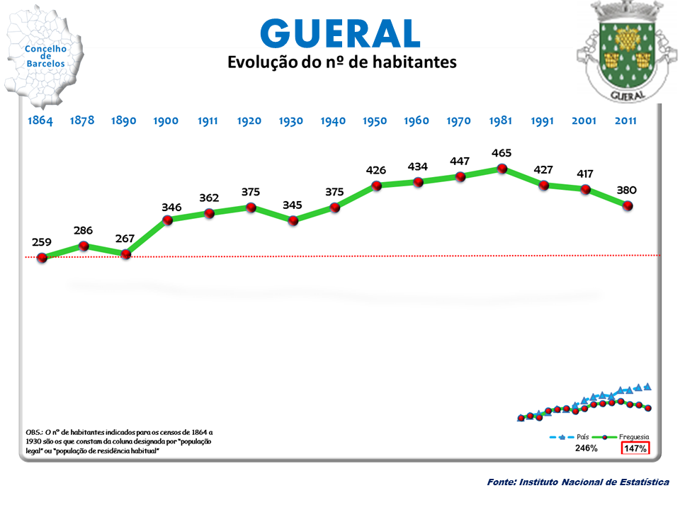 Censos 1964/2011